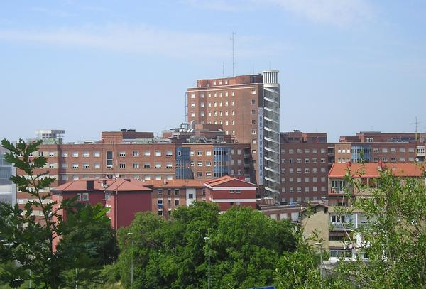 Gurutzetako ospitalearen ikuspegia.